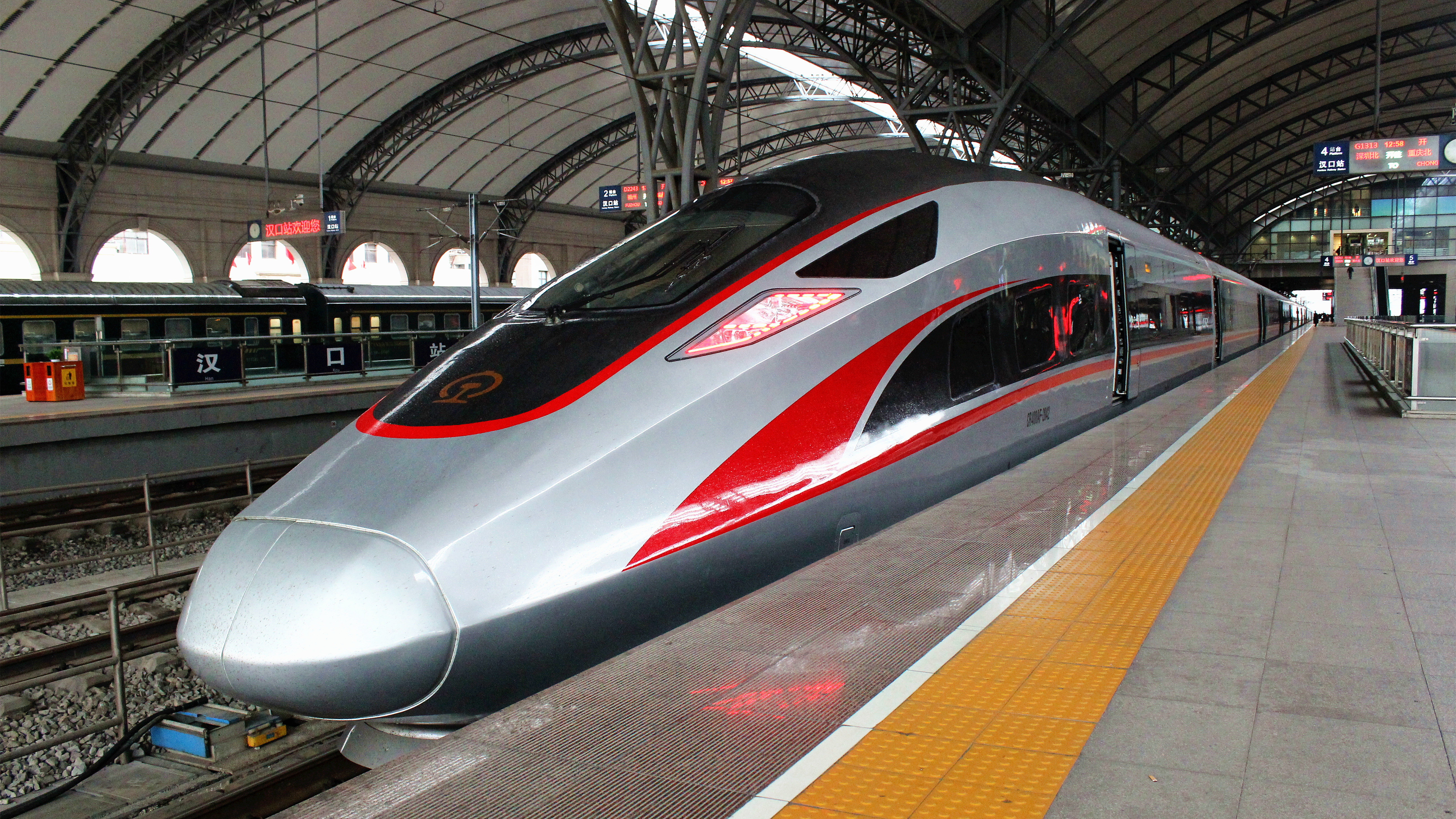 由CR400AF型电力动车组担当的G1312/3次停靠于汉口站。